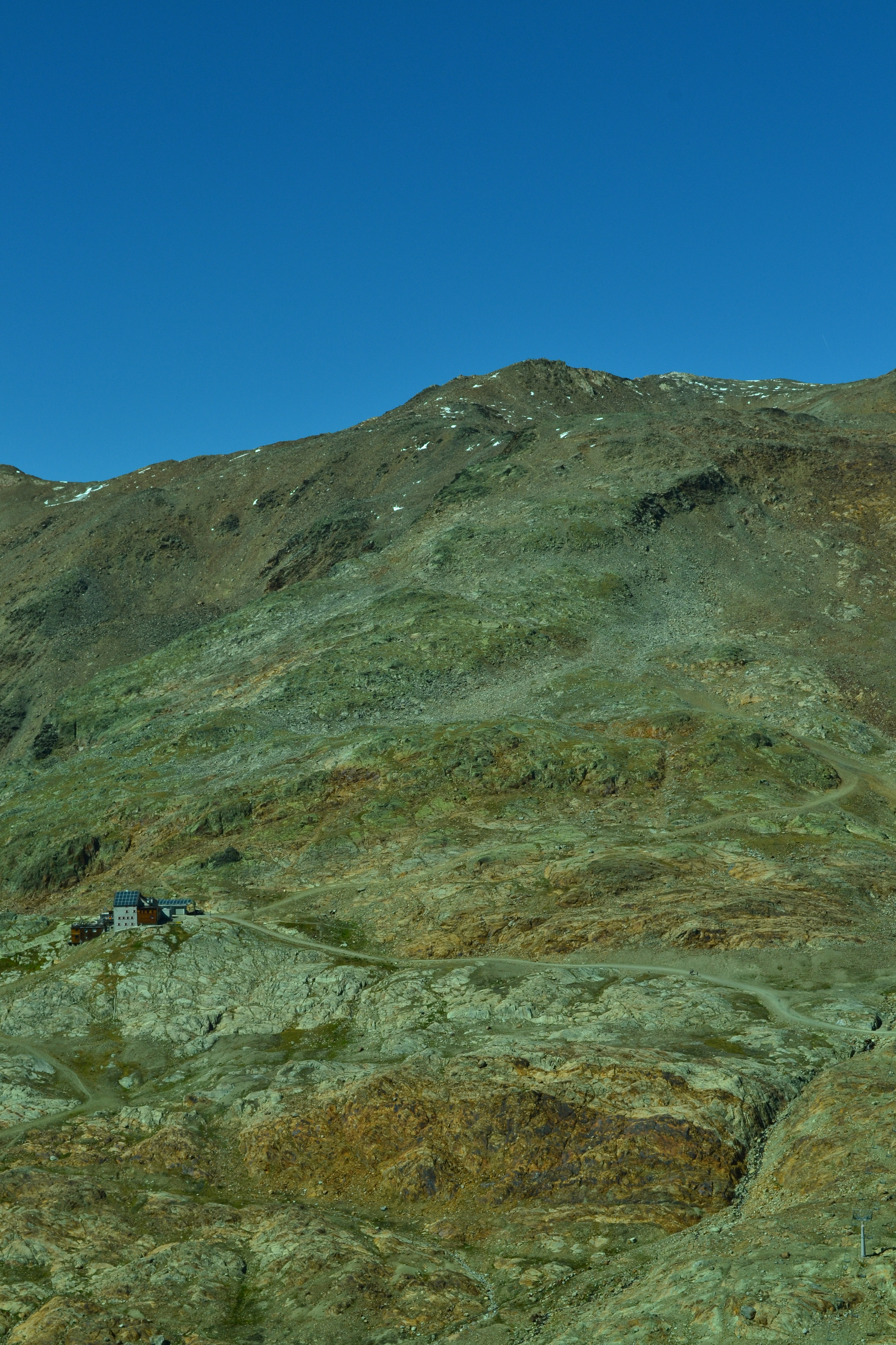 Blick auf Im hinteren Eis vom Anstieg auf den Grawand. Links in der Bildmitte die Schöne-Aussicht-Hütte.